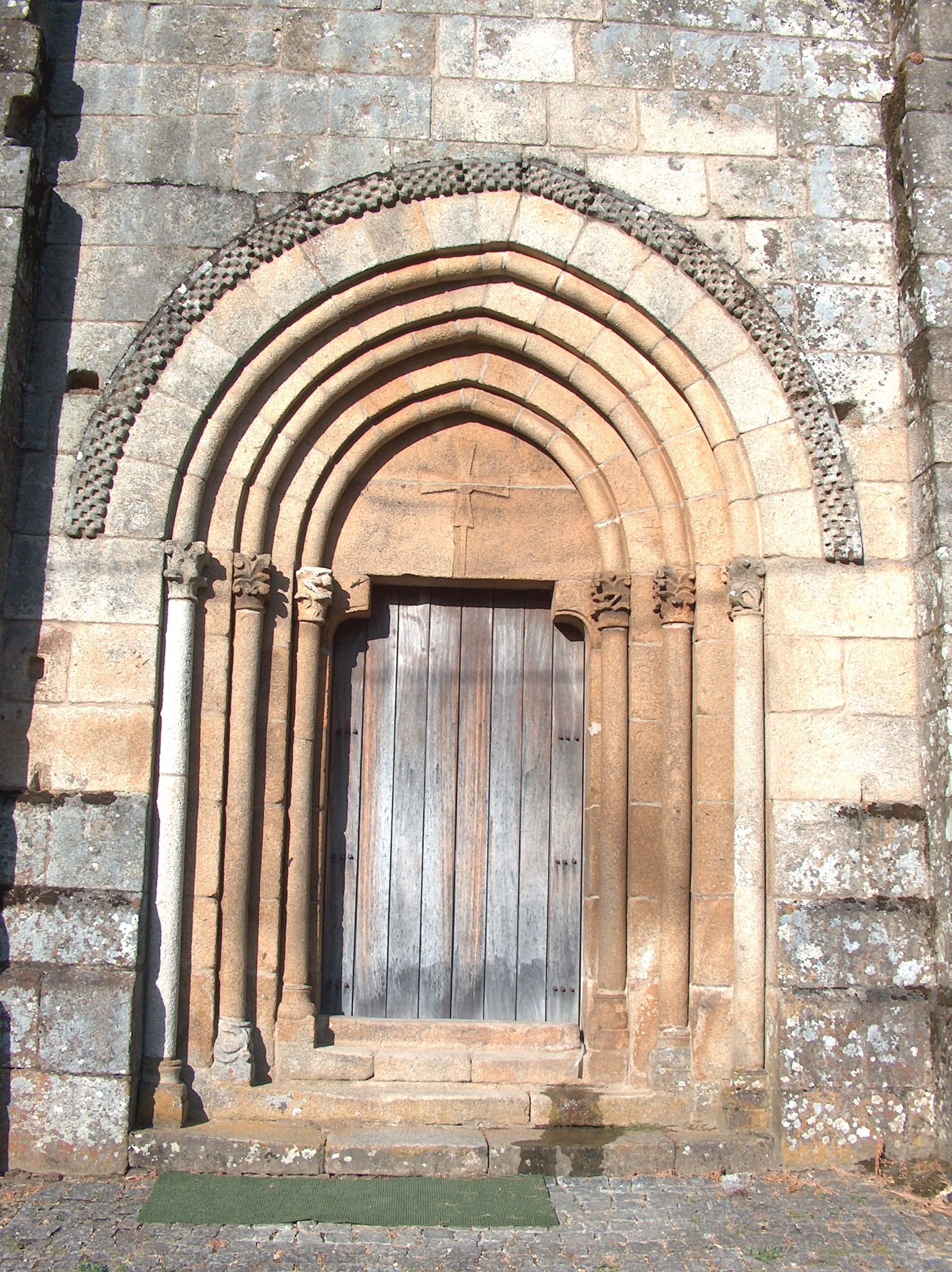 Igreja de Nossa Senhora da Conceição (Ermida). Ermida de Paiva, Castro Daire, Portugal.